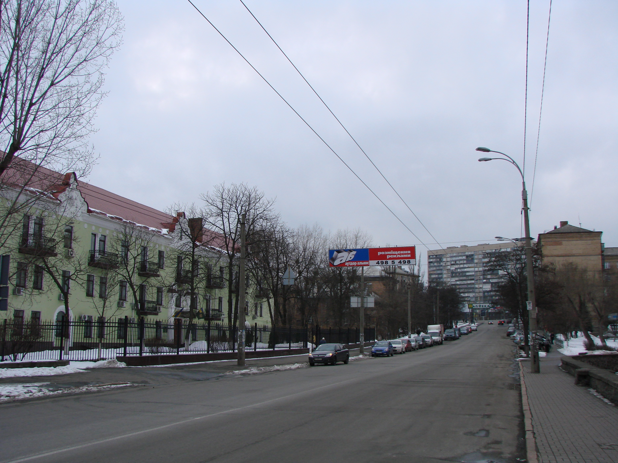 Вулиця Бастіонна